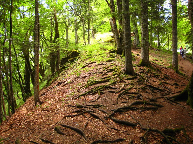 Перучица 2